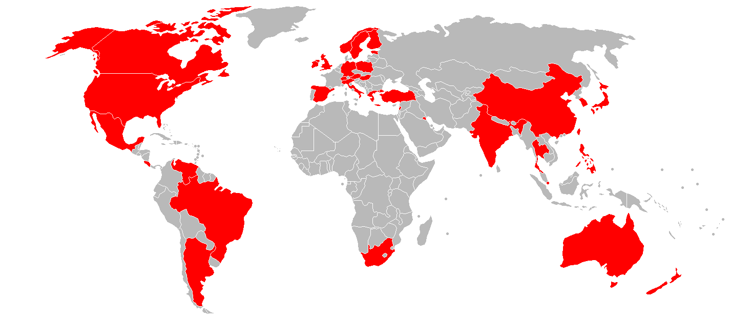 Partner universities of BEM (Bordeaux Ecole de Management)